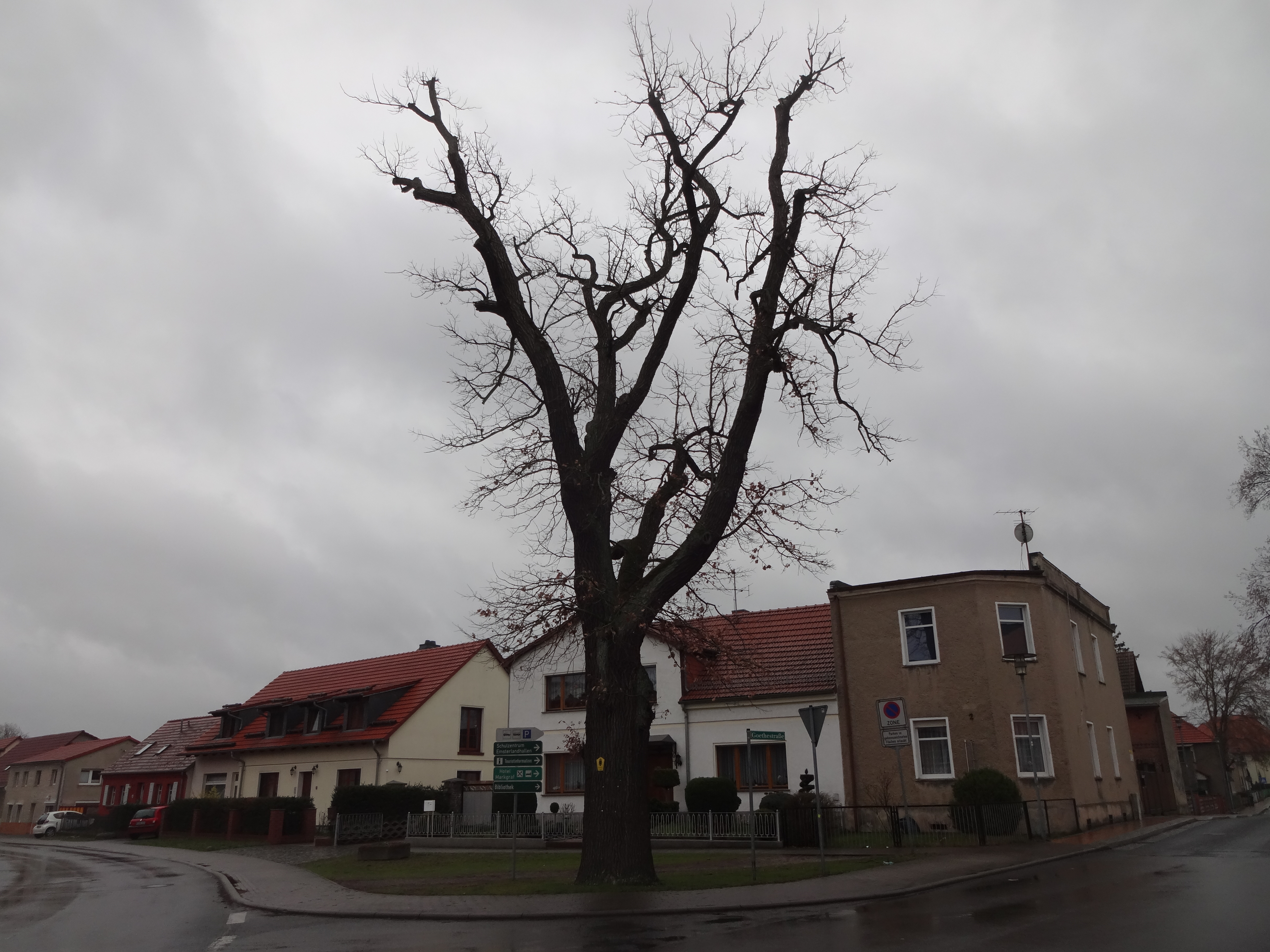 als Naturdenkmal geschützte Stieleiche in der Gartenstraße in Lehnin